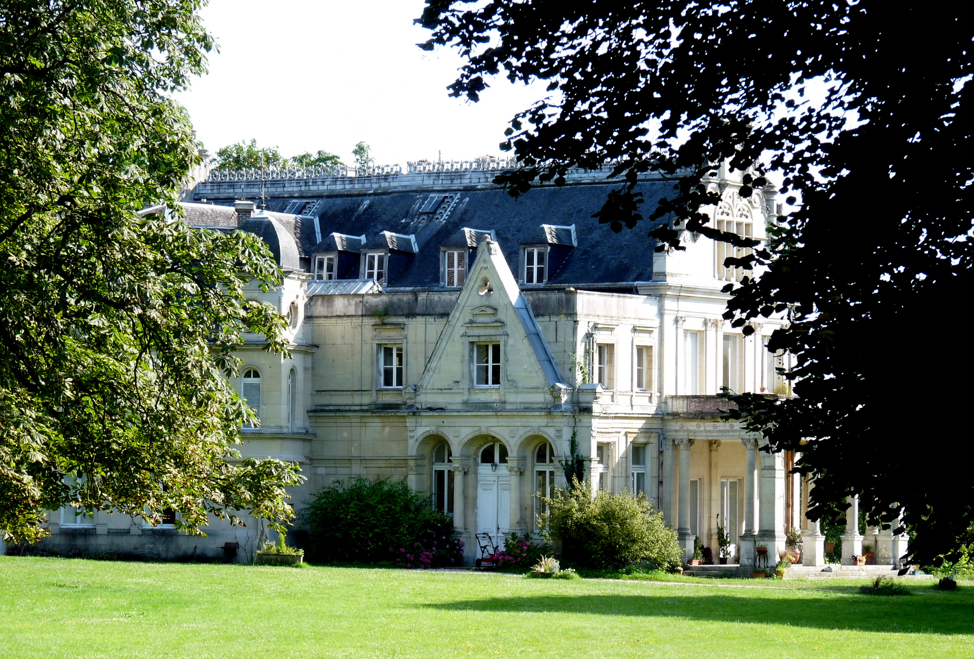 Château de la Madeleine .